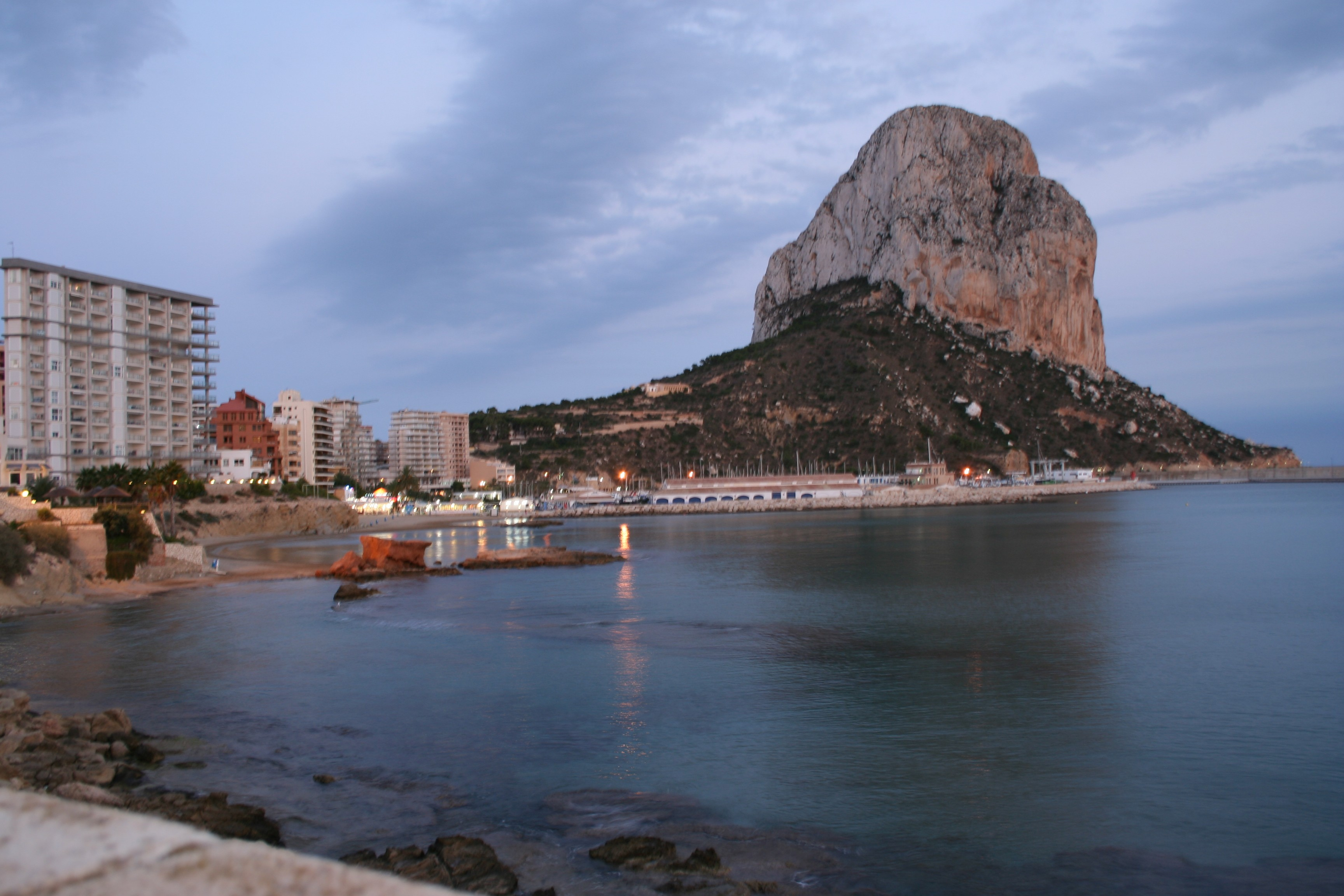 Vista de aterdecer en el peñon de Ifac